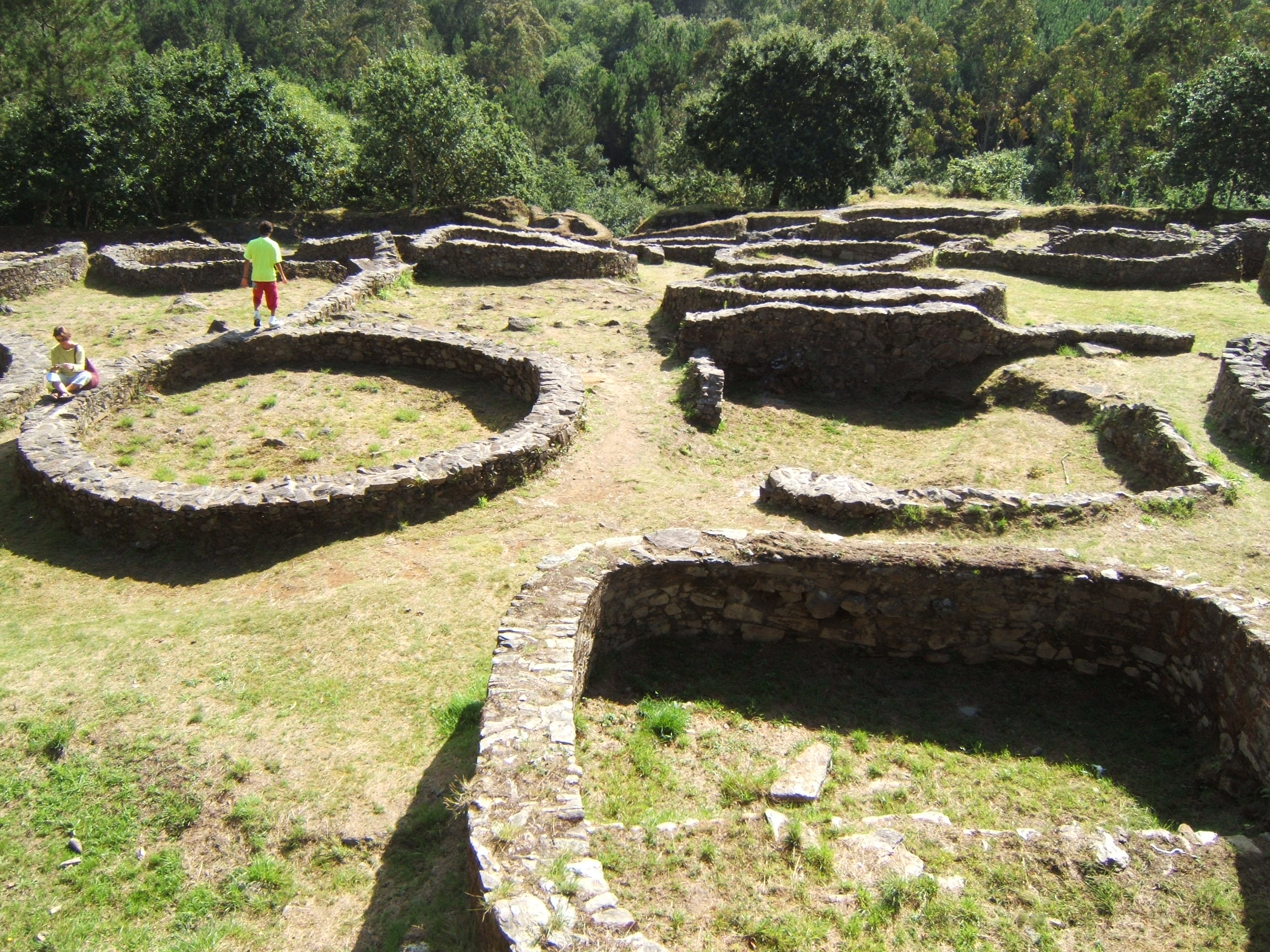 Castro de Borneiro, cerca de Ponteceso, Galicia España